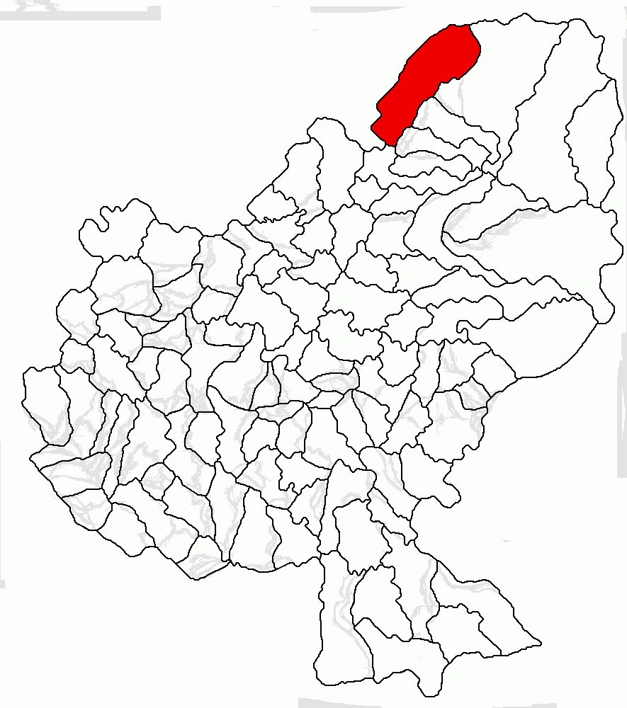 Categorie:Hărţi ale judeţului Mureş